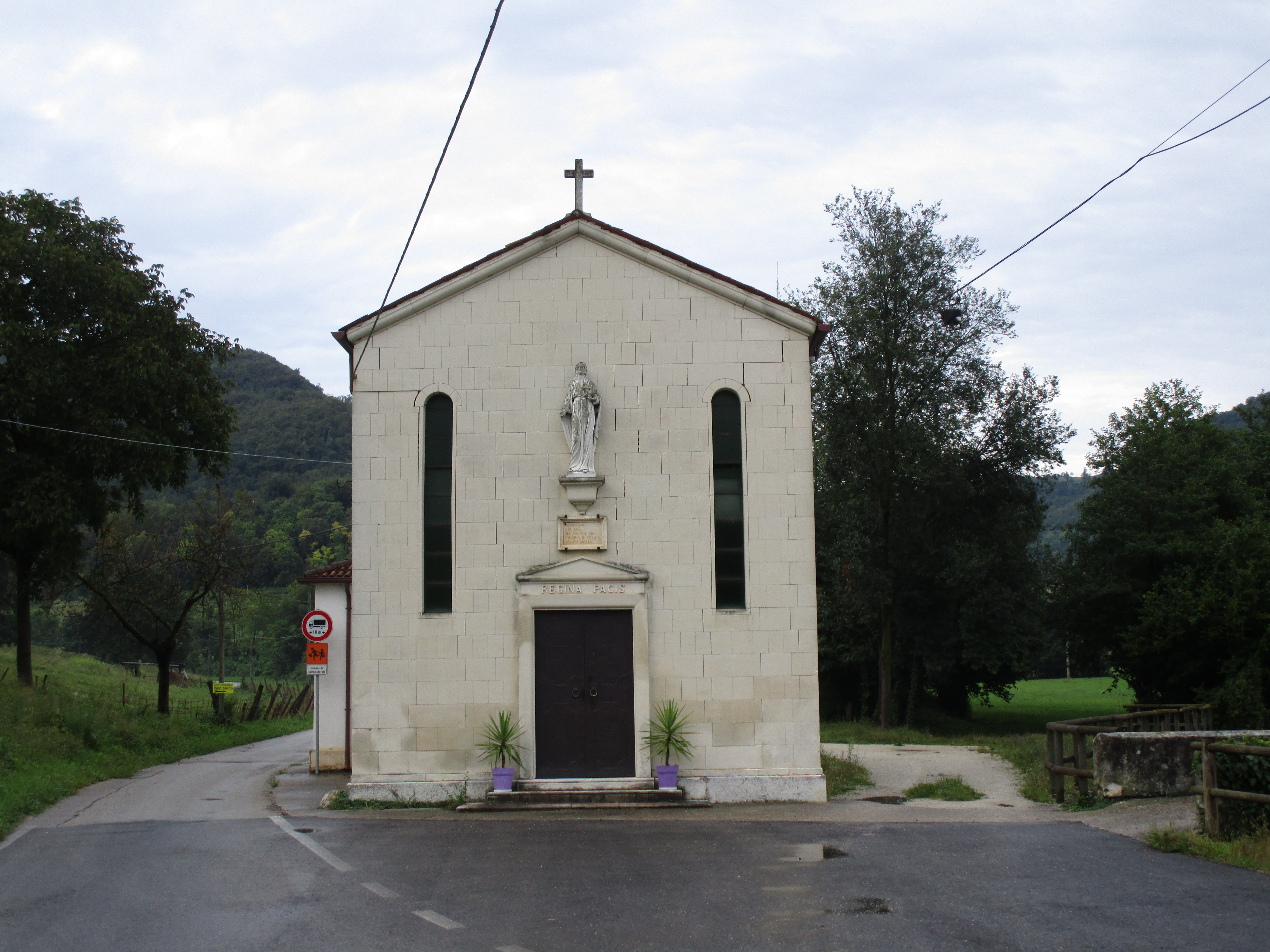 Castelgomberto, Chiesetta Regina Pacis